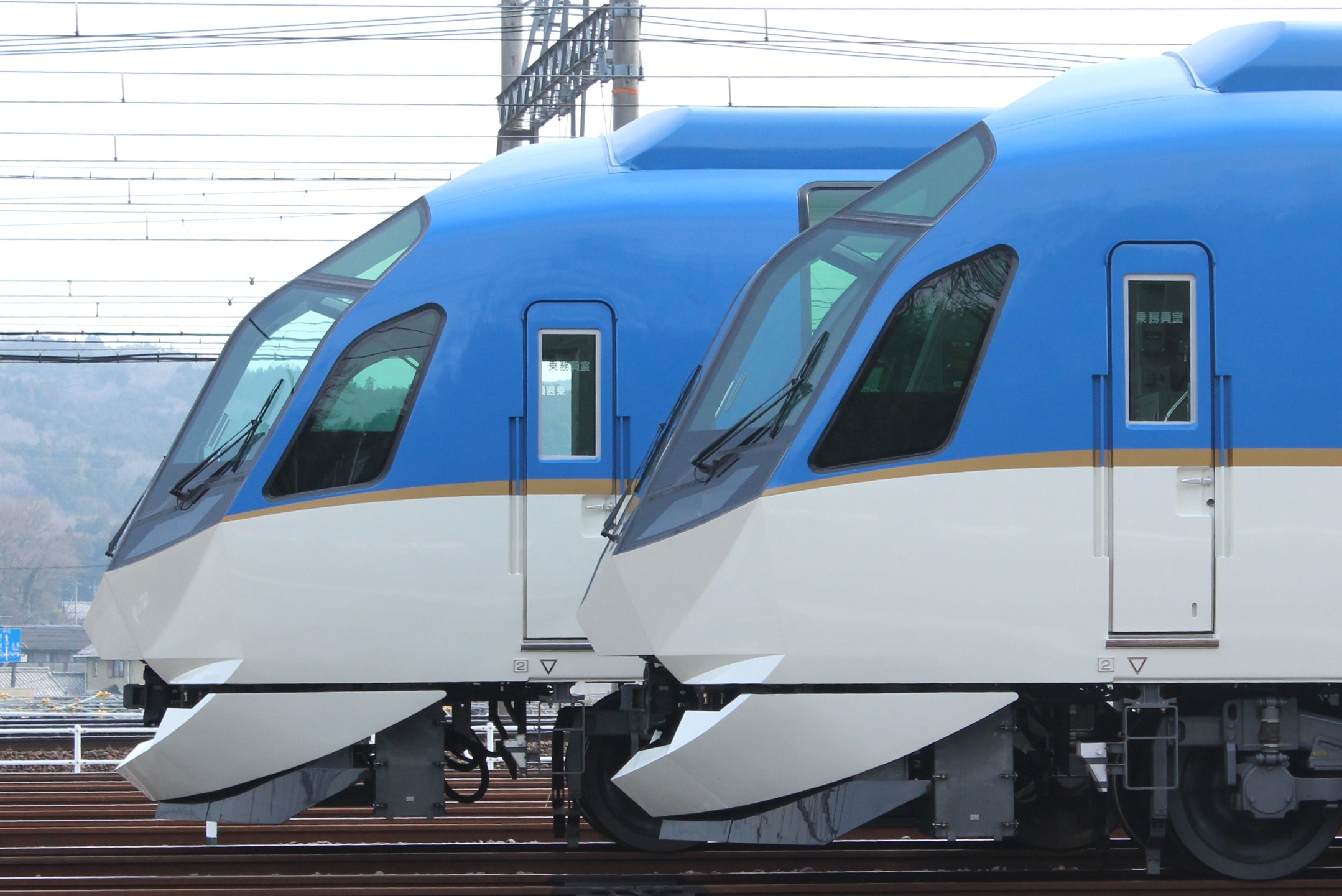 近鉄50000系サイドビュー